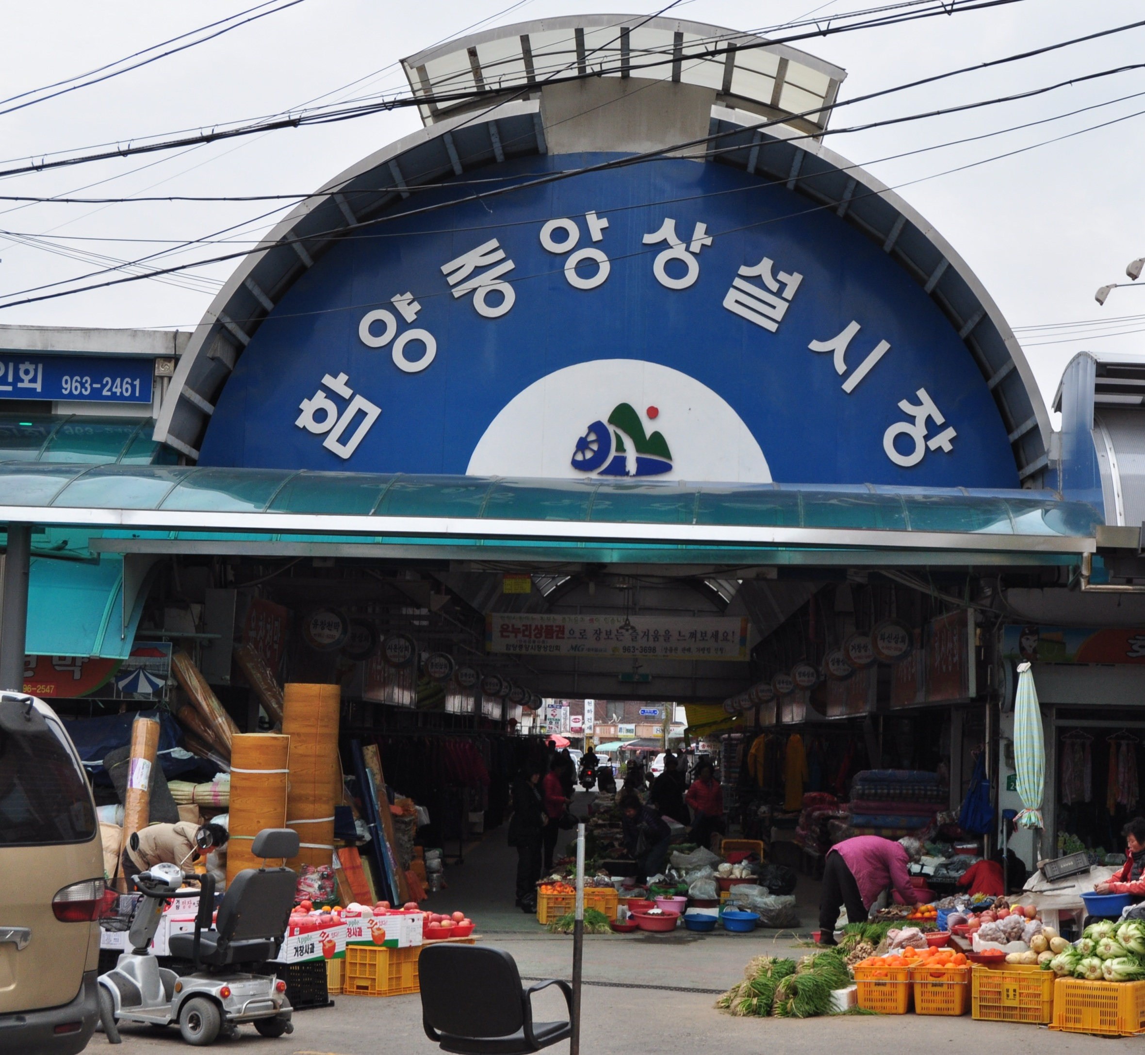 함양 중앙상설시장